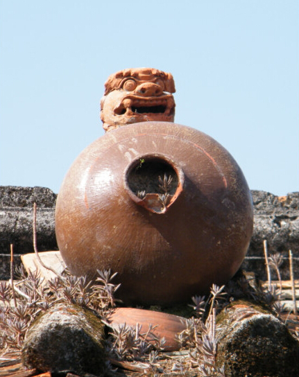 中文（中国大陆）: 广东省汕头市达濠老厝厝顶的风狮